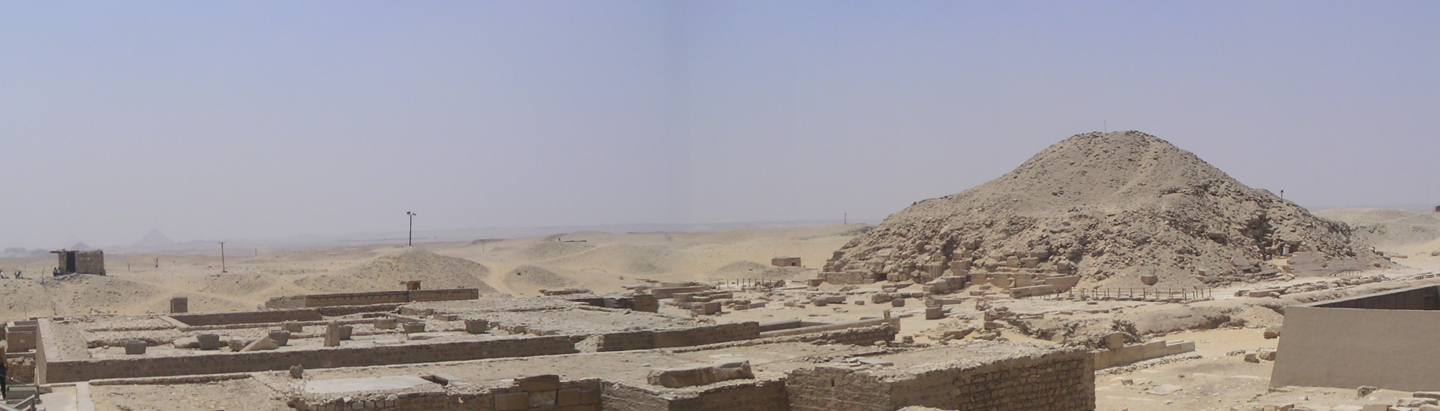 Vue panoramique du complexe funéraire d'Ounas et de ses environs, prise depuis l'enceinte de Djéser à Saqqarah